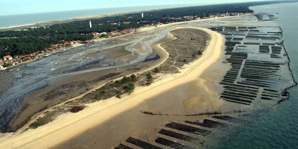 doc SO